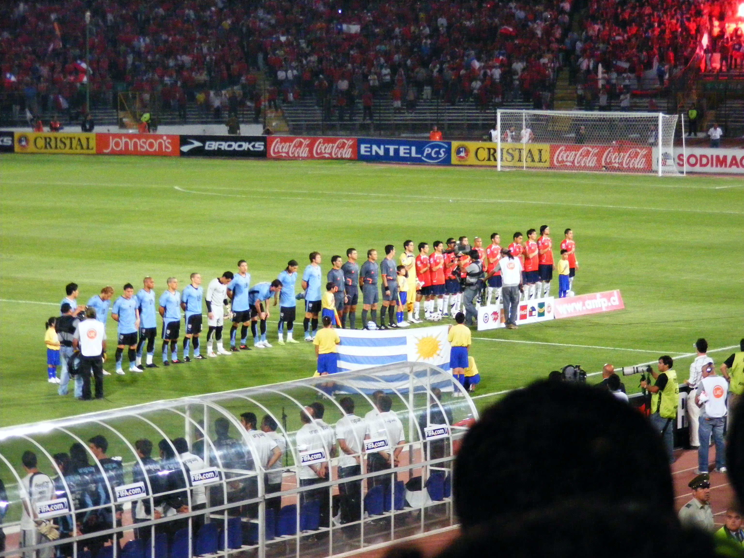 Estadio Nacional Julio Martínez Prádanos, 1 de abril de 2009 : Eliminatorias de la CONMEBOL para la Copa Mundial de Fútbol de 2010, partido Chile vs Uruguay, resultado Chile 0 - Uruguay 0.